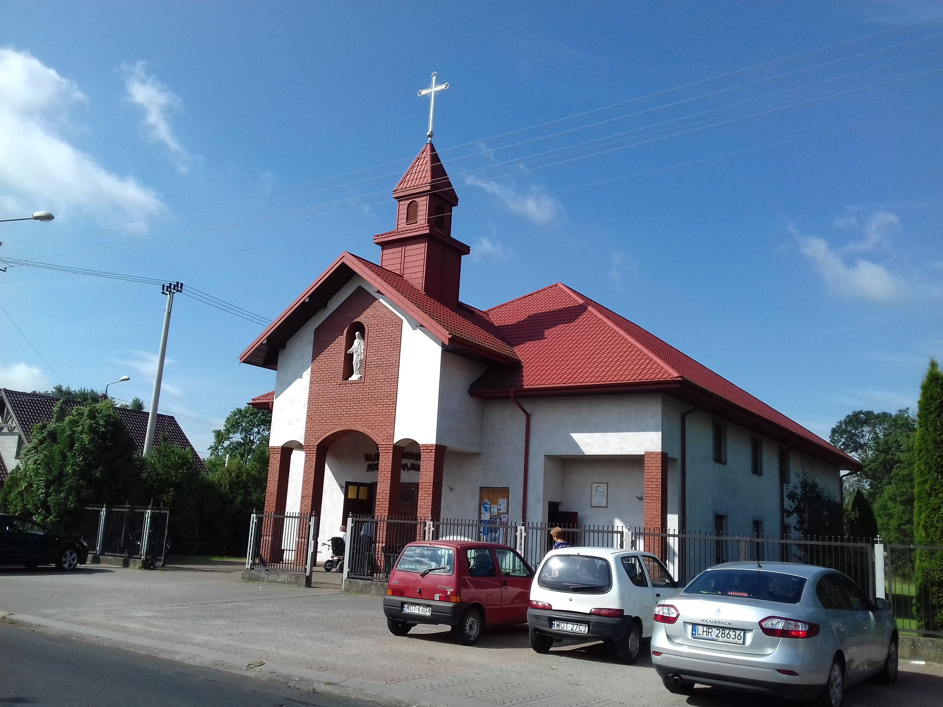 Sobiekursk (gm. Karczew, pow. Otwock) - kościół filialny MB Częstochowskiej